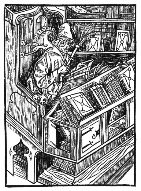 Johannes Geiler von Kaysersberg: Navicula sive Speculum fatuorum. Straßburg